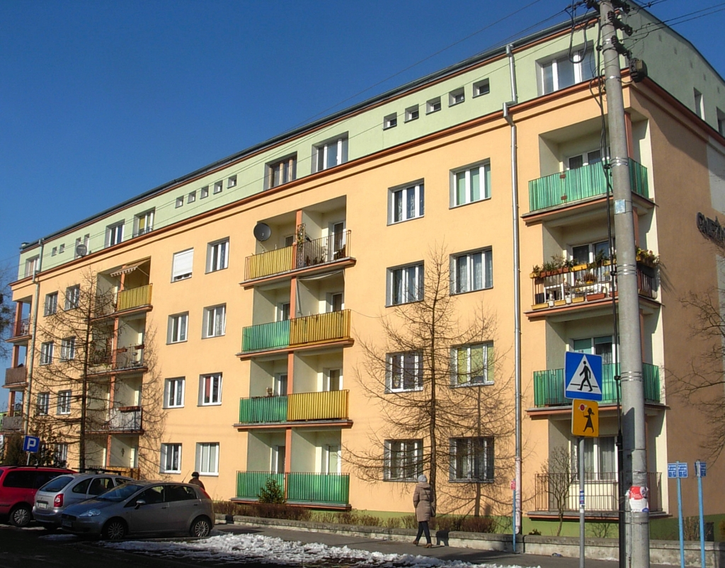 Zabudowa na osiedlu Górzyskowo w Bydgoszczy